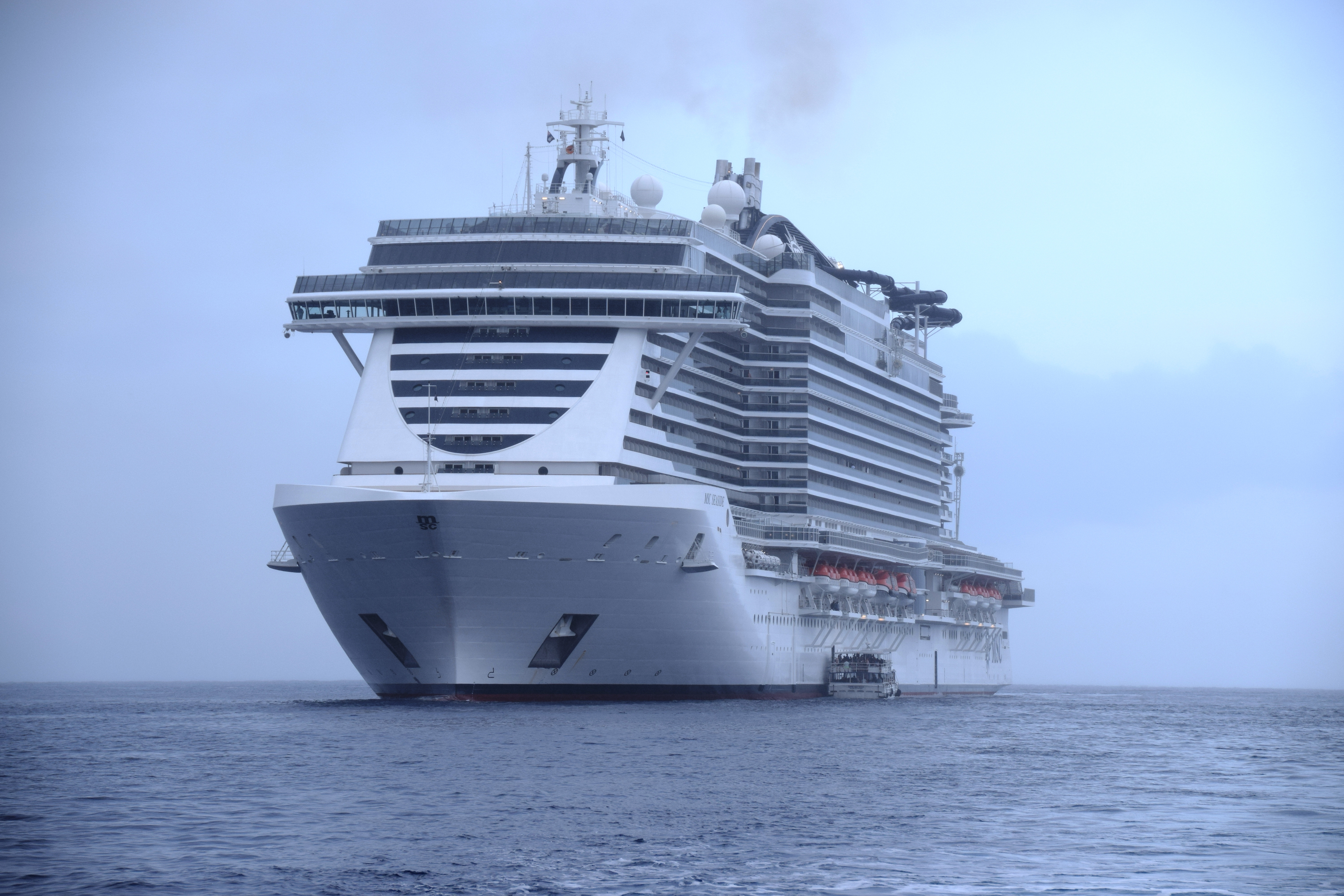 MSC Seaside